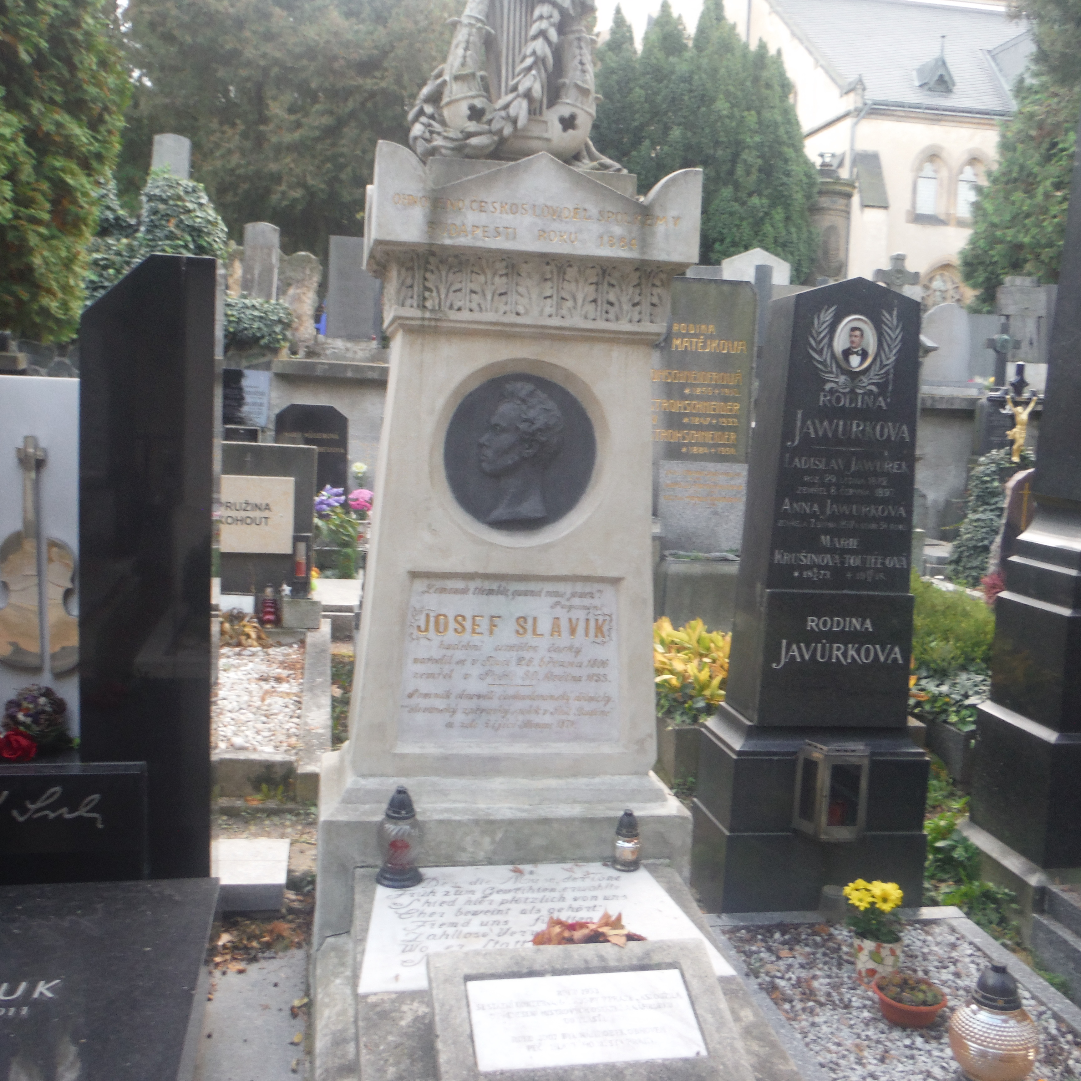 hrob